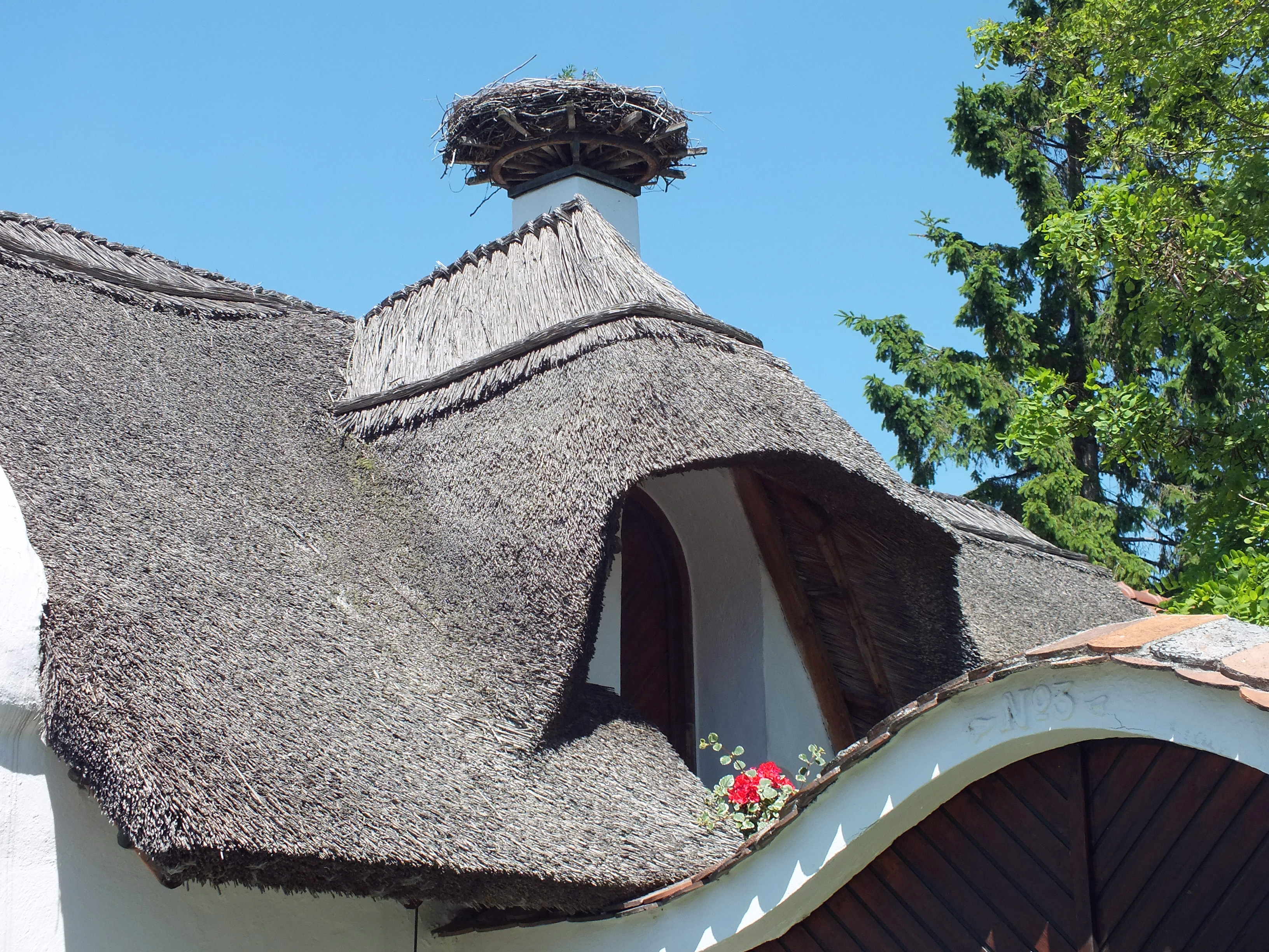 Reetdach in Apetlon